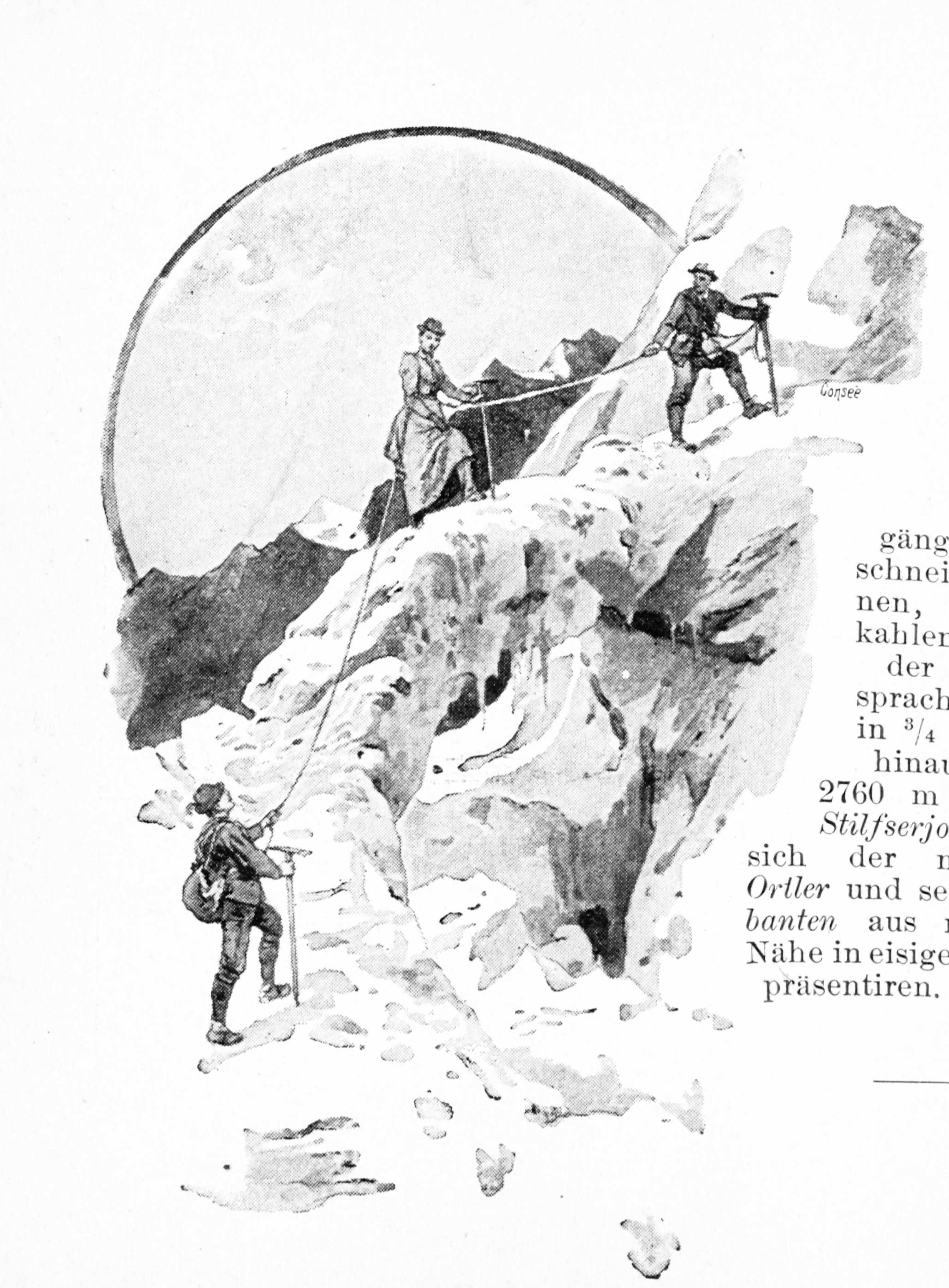 Tony Grubhofer ohne Titel ("Seilschaft") 1899